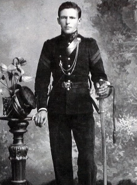 Na década de 1920, o então jovem oficial da cavalaria da Força Pública do Estado de São Paulo, Júlio Marcondes Salgado.